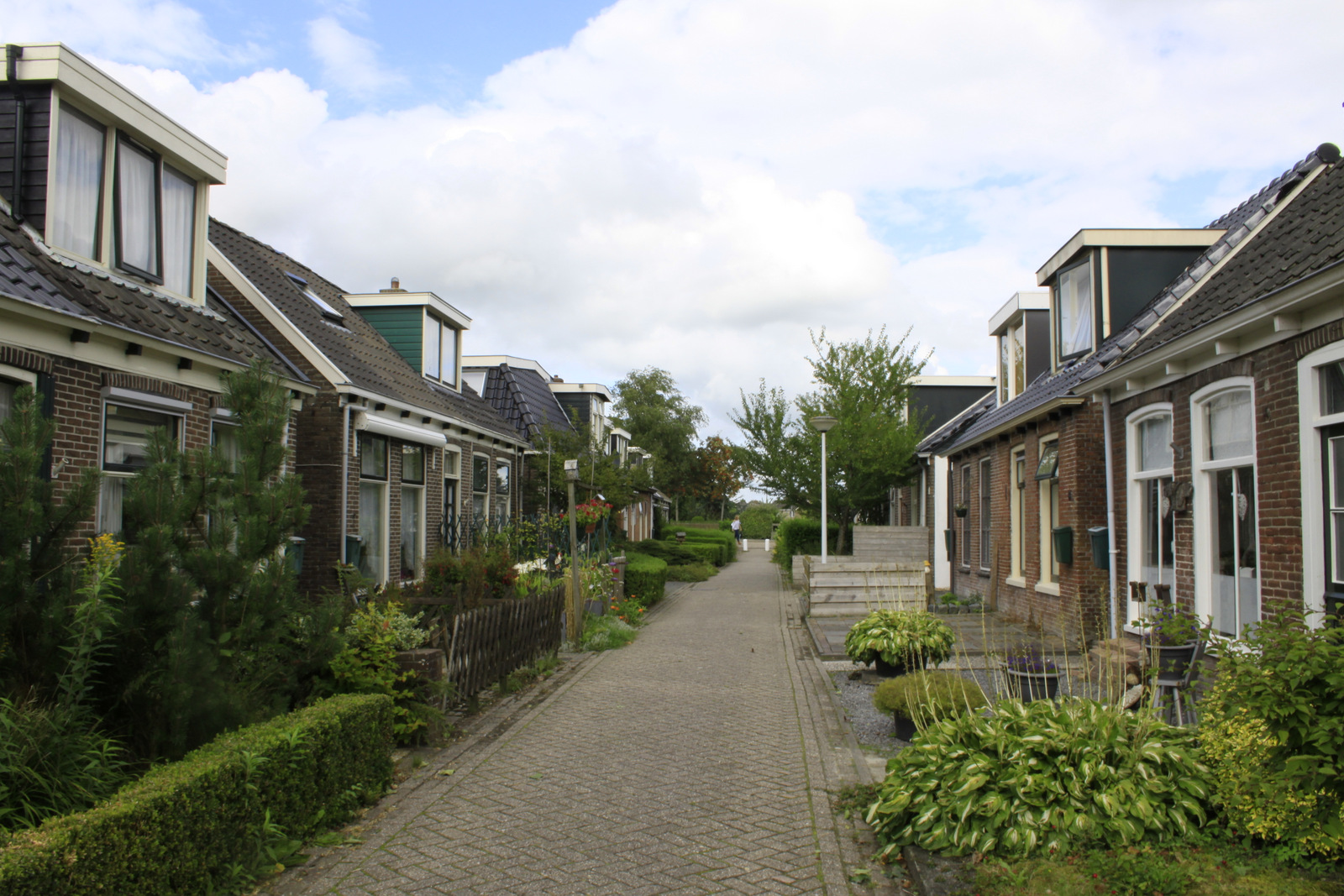 De Uniabuert in Stiens.